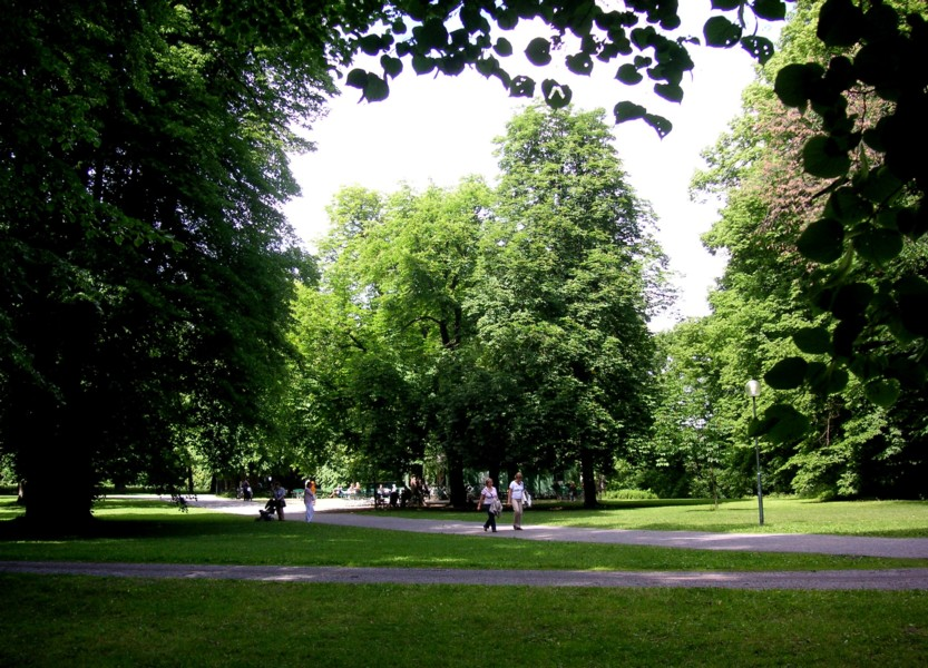 Engelsk park i Hagaparken